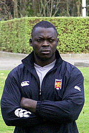 Cyril Nana